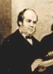 William Hunter, Jr. (1805–1886)